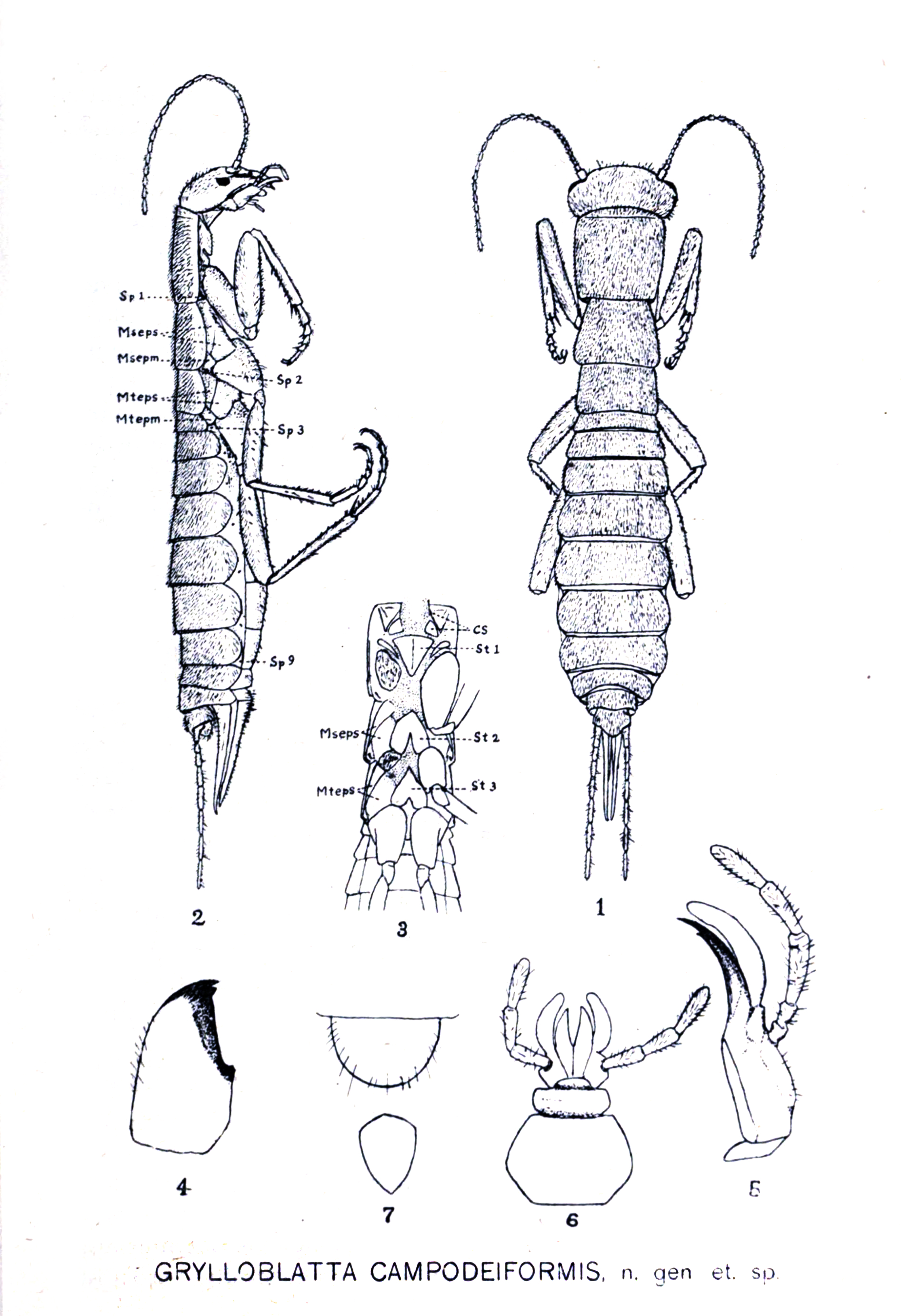 Grylloblatta campodeiformis